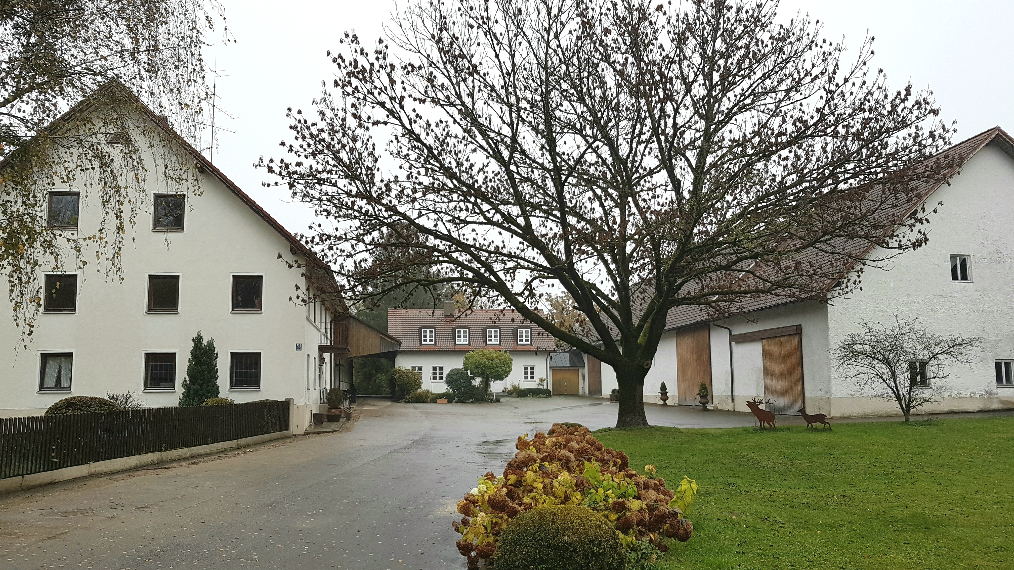 München-Kleinhadern, der denkmalgeschützte Stürzerhof.